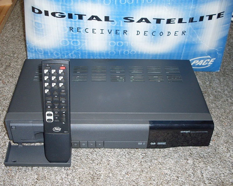 Pace 500 G4 Batch. De eerste digitale satellietreceiver gemaakt door Pace.